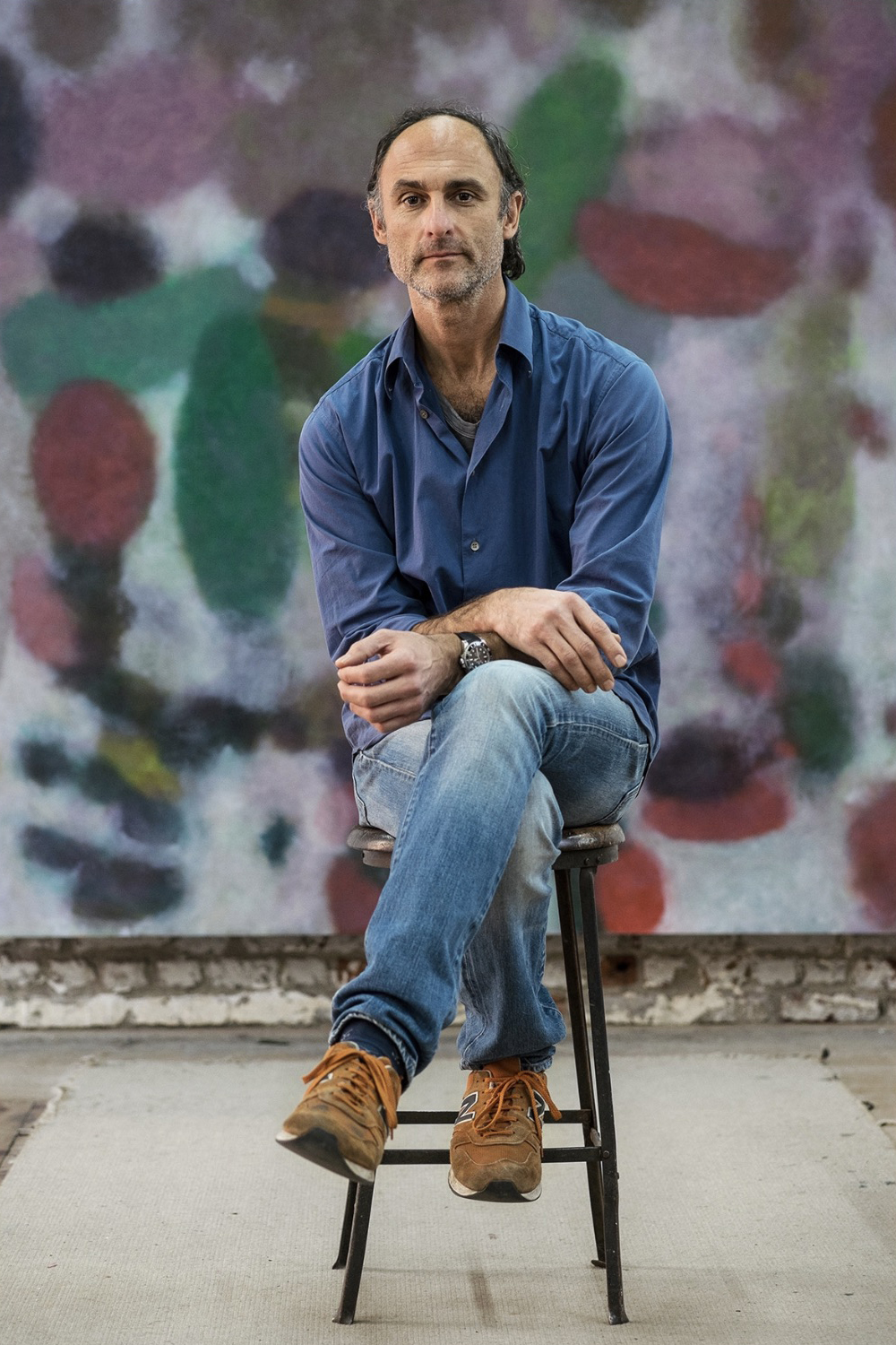 Jeff Kowatch portrait devant son oeuvre au sein de son atelier